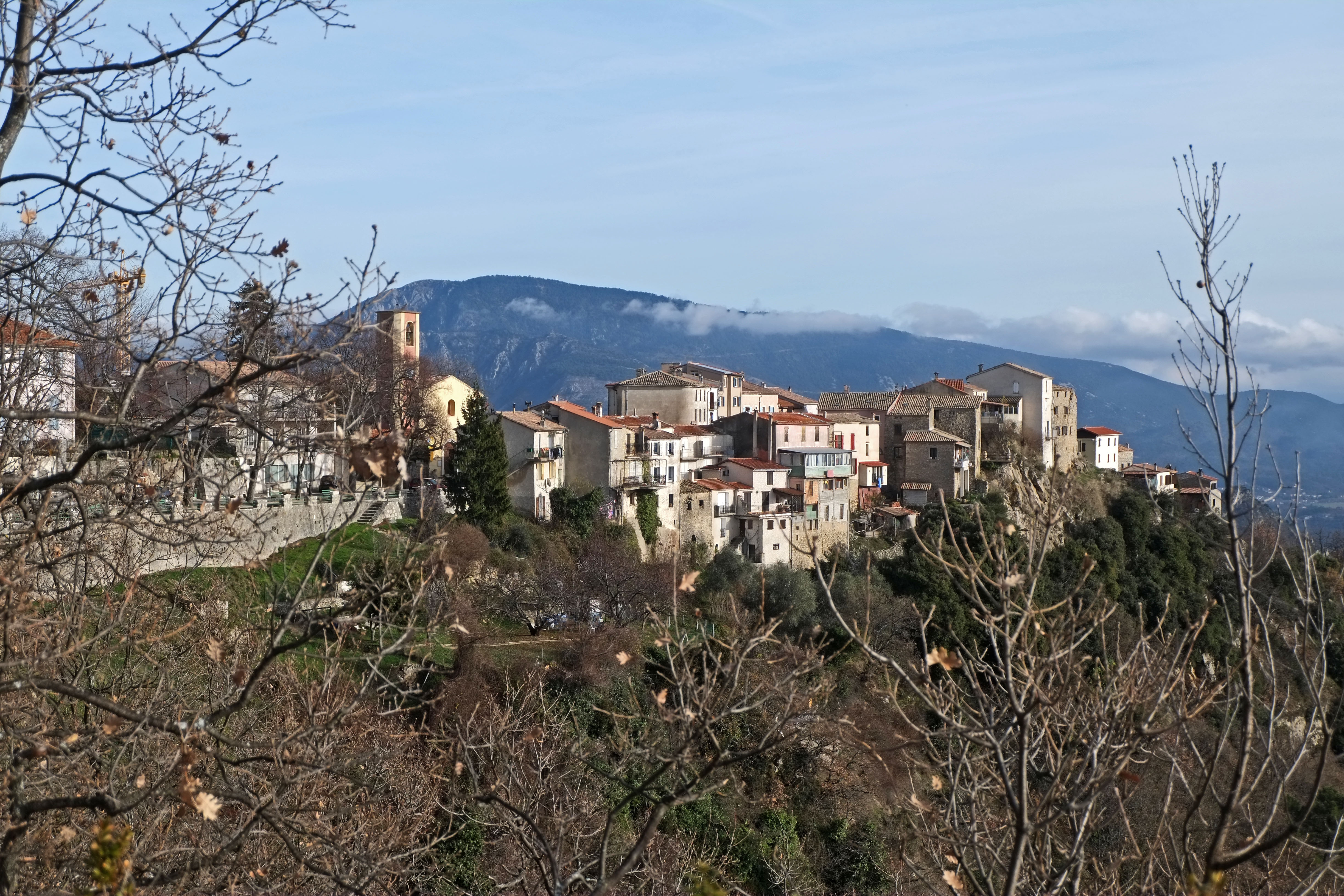 Vue du village de Revest-les-Roches en venant de Tourette-du-Château.